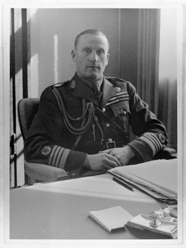 Eesti Vabariigi Presidendi kantselei. Presidendi vanem käsundusohvitser kolonel Herbert Grabbi